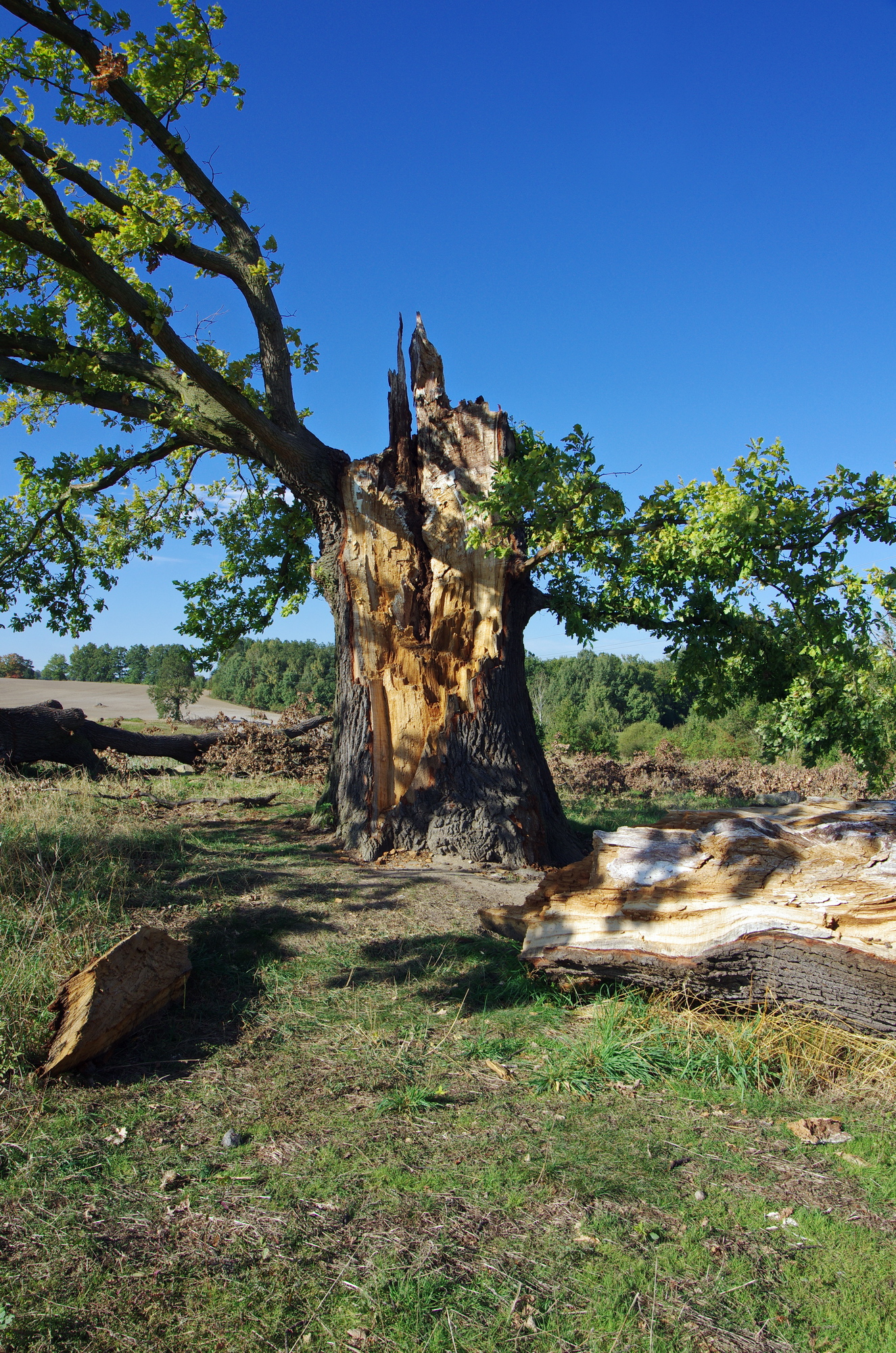 Památný strom - Dub v Jedličné - zaniklá osada Jedličná, okres Cheb